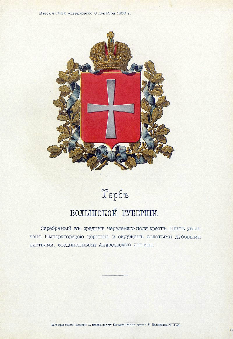 Official Russian Empire coat of arms Volyn Governorate. Герб Российской Империи Волынской губернии с официальным описанием в Гербовнике Бенке. Утверждён Императором Всероссийским Александром Вторым.